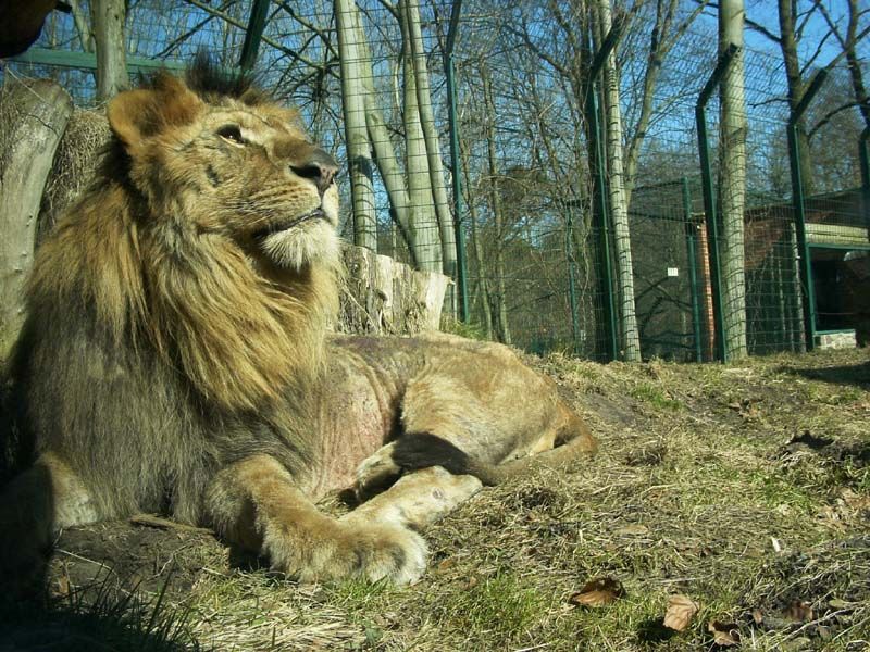 Szene im Tierpark Eberswalde